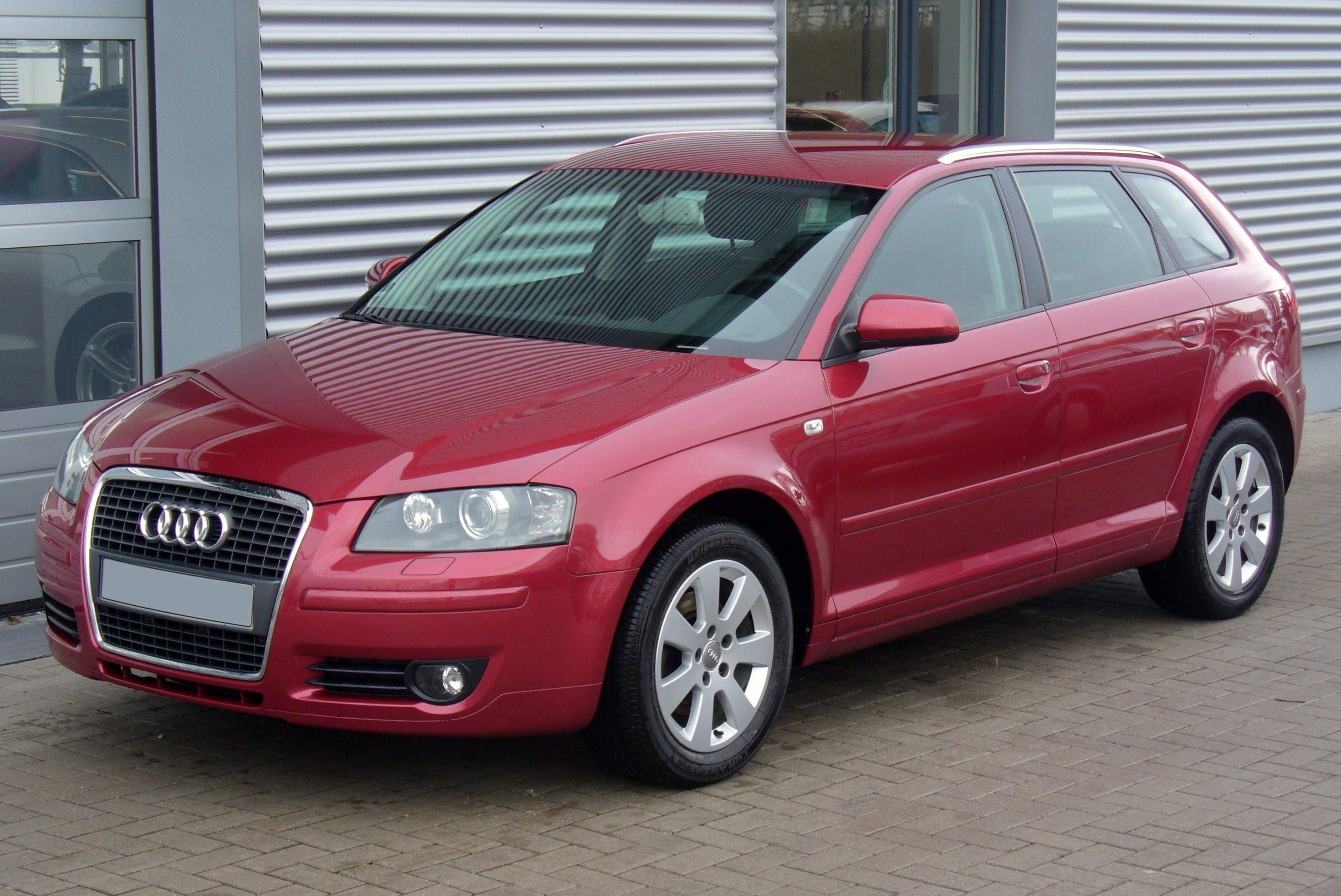 Audi A3 8PA